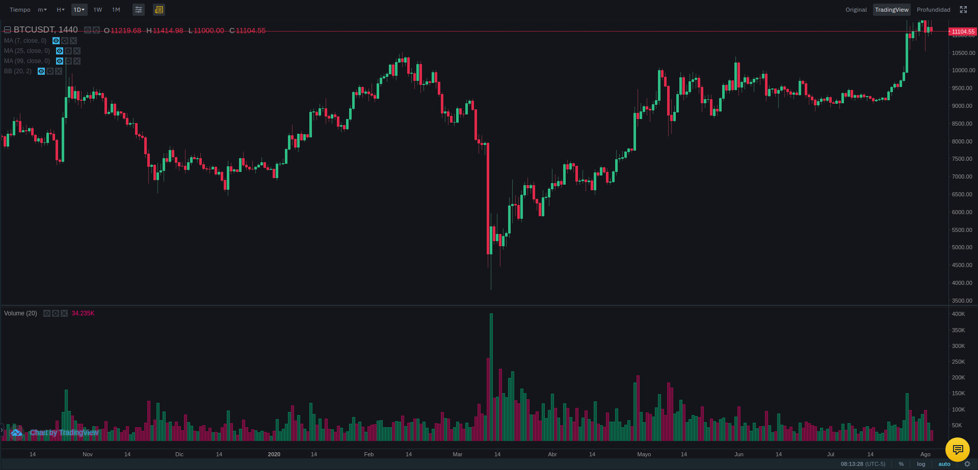 Gráfico de velas del precio del Bitcoin en periodo diario.